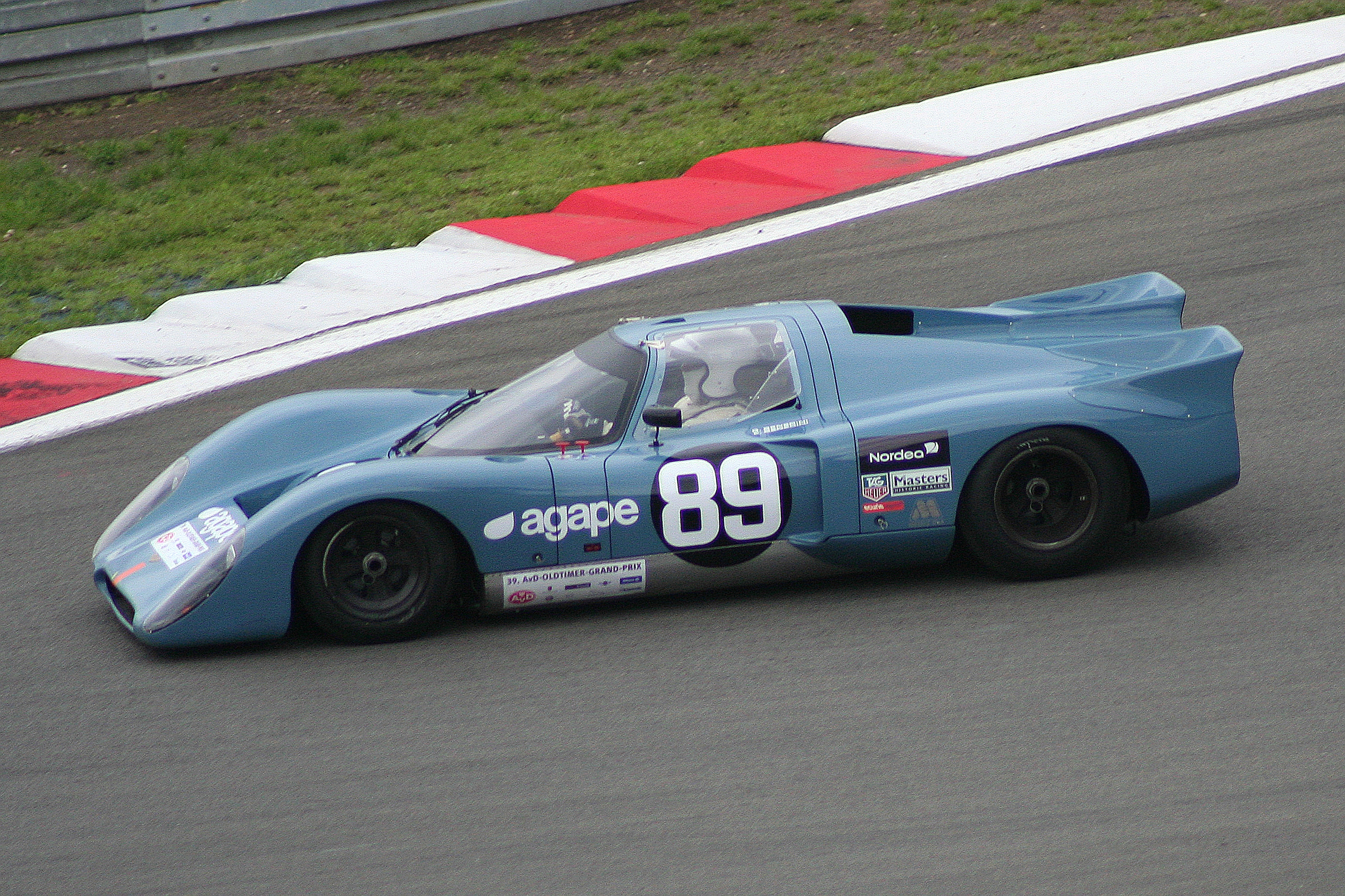 Chevron B 16, Baujahr 1969, beim AvD-Oldtimer-Grand-Prix auf dem Nürburgring unmittelbar vor der Mercedes-Arena